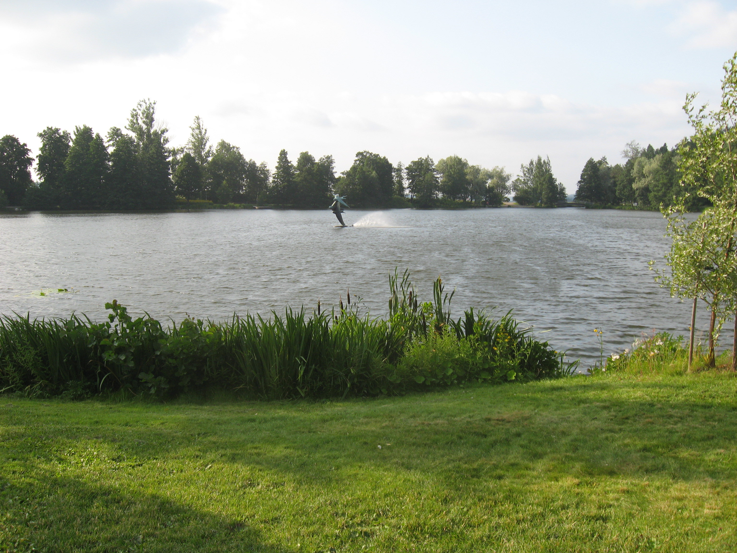 Pikku-Vesijärveä